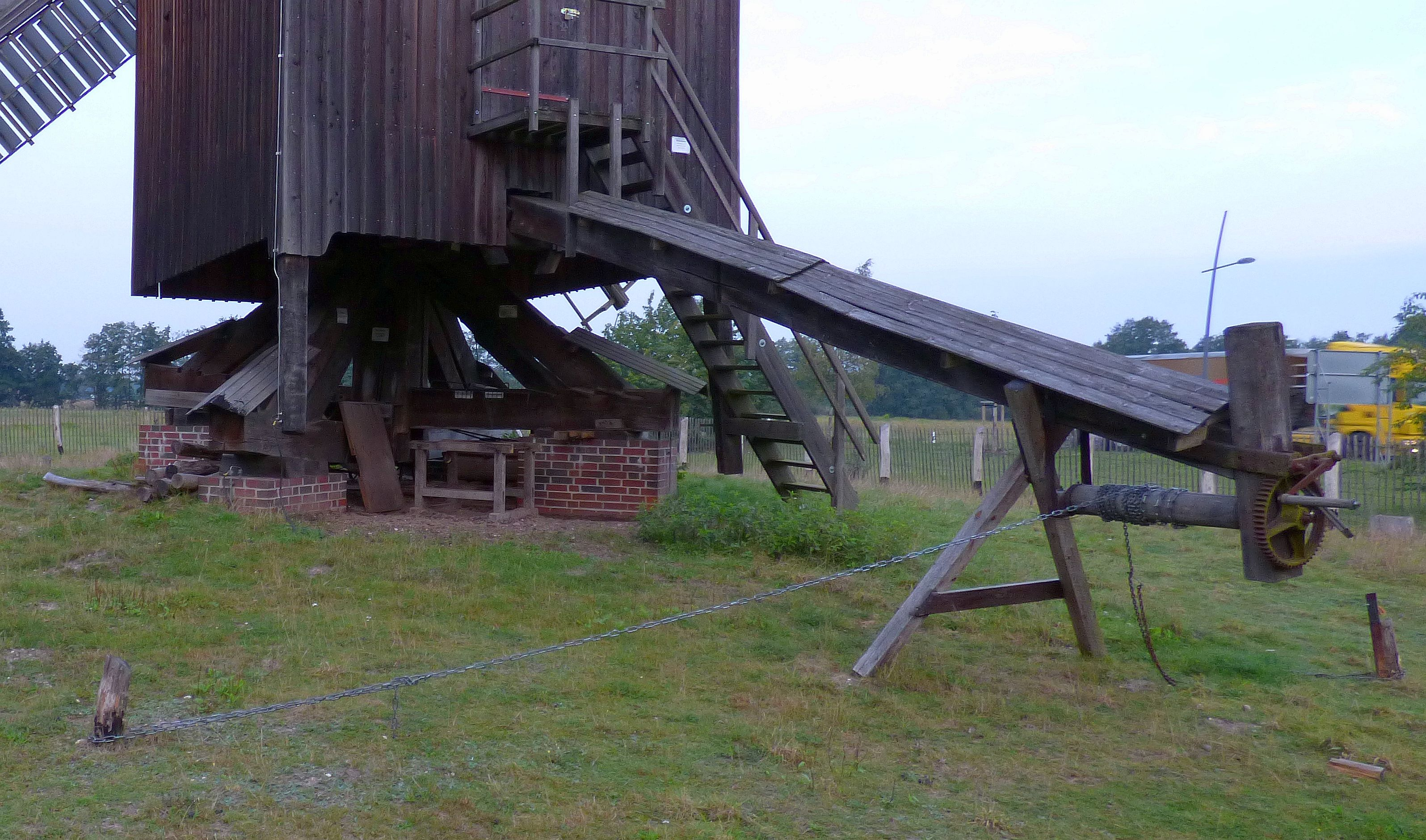 Bockwindmühle in Bad Düben (Hausbaum mit Sterz), Sachsen, Deutschland, errichtet ursprünglich 1840, 2005/2006 Restauration